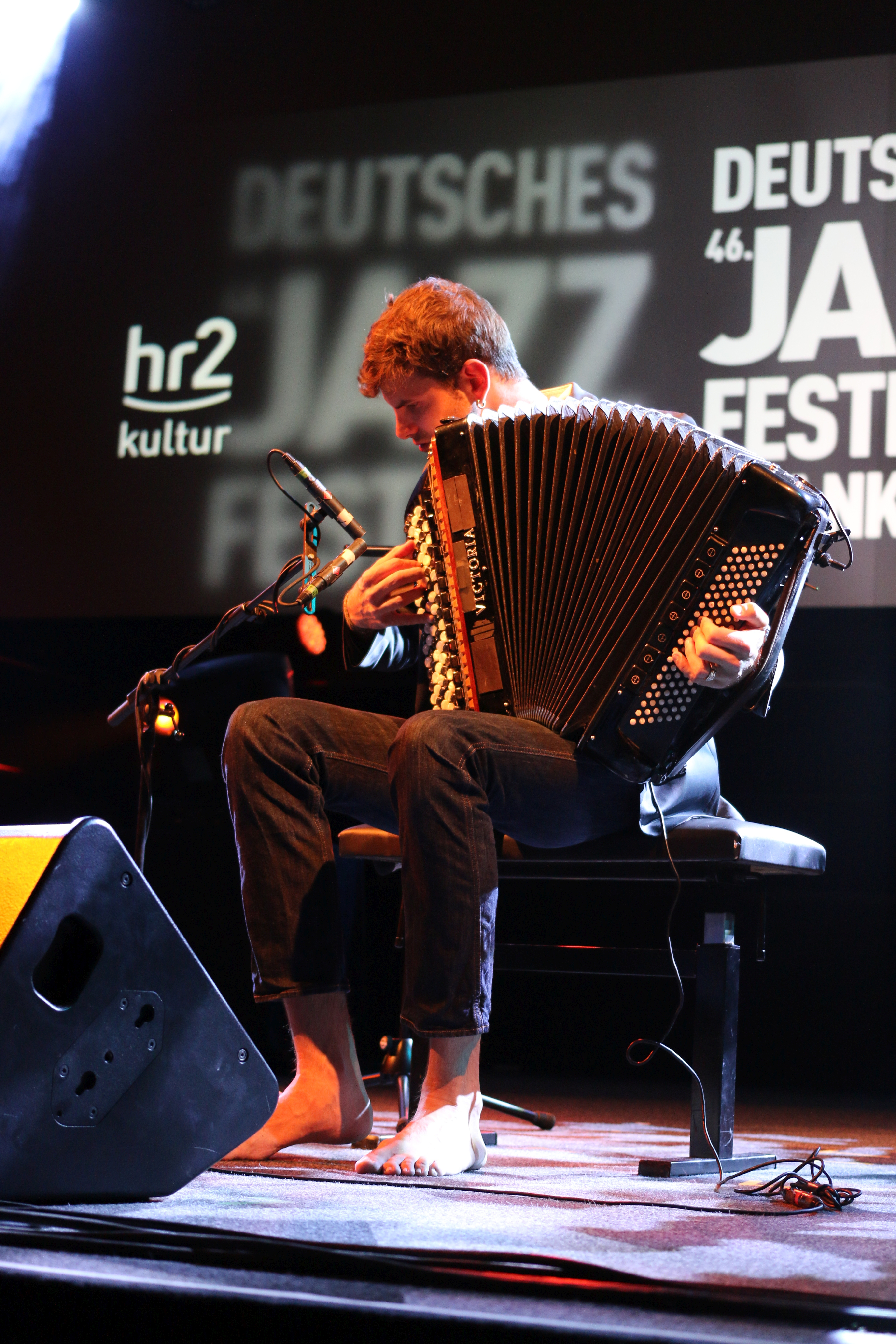 46. Deutsches Jazzfestival Frankfurt 2015: Duo Belle Epoque: Vincent Peirani